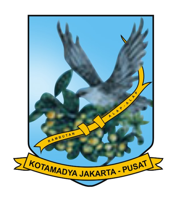 Seal of Central Jakarta